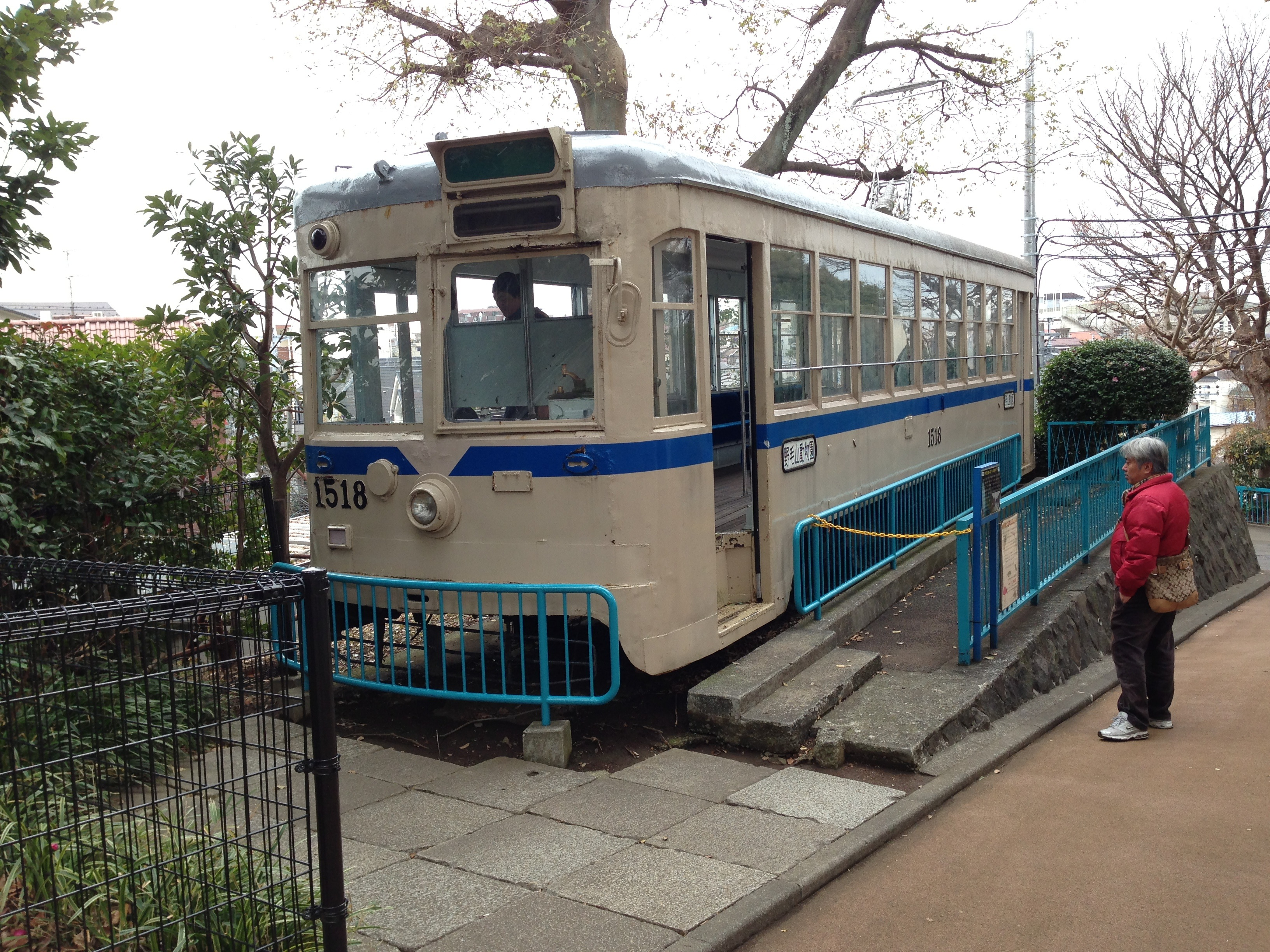 野毛山動物園の市電。